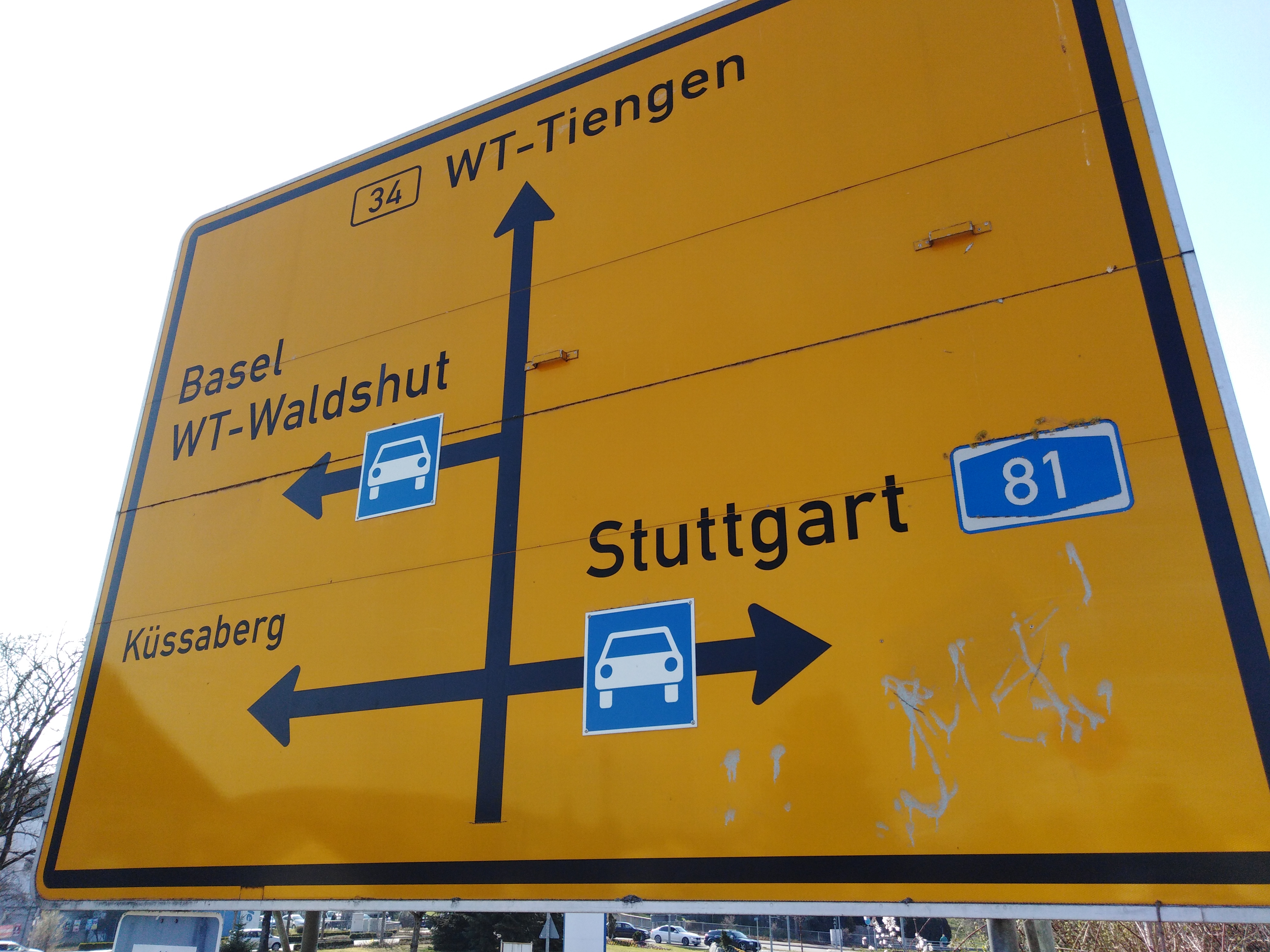 Lauchringen, Gemeinde im Landkreis Waldshut in Baden-Württemberg. Verkehrsknotenpunkt (Endpunkt A 98 und Zubringer zur A 81).